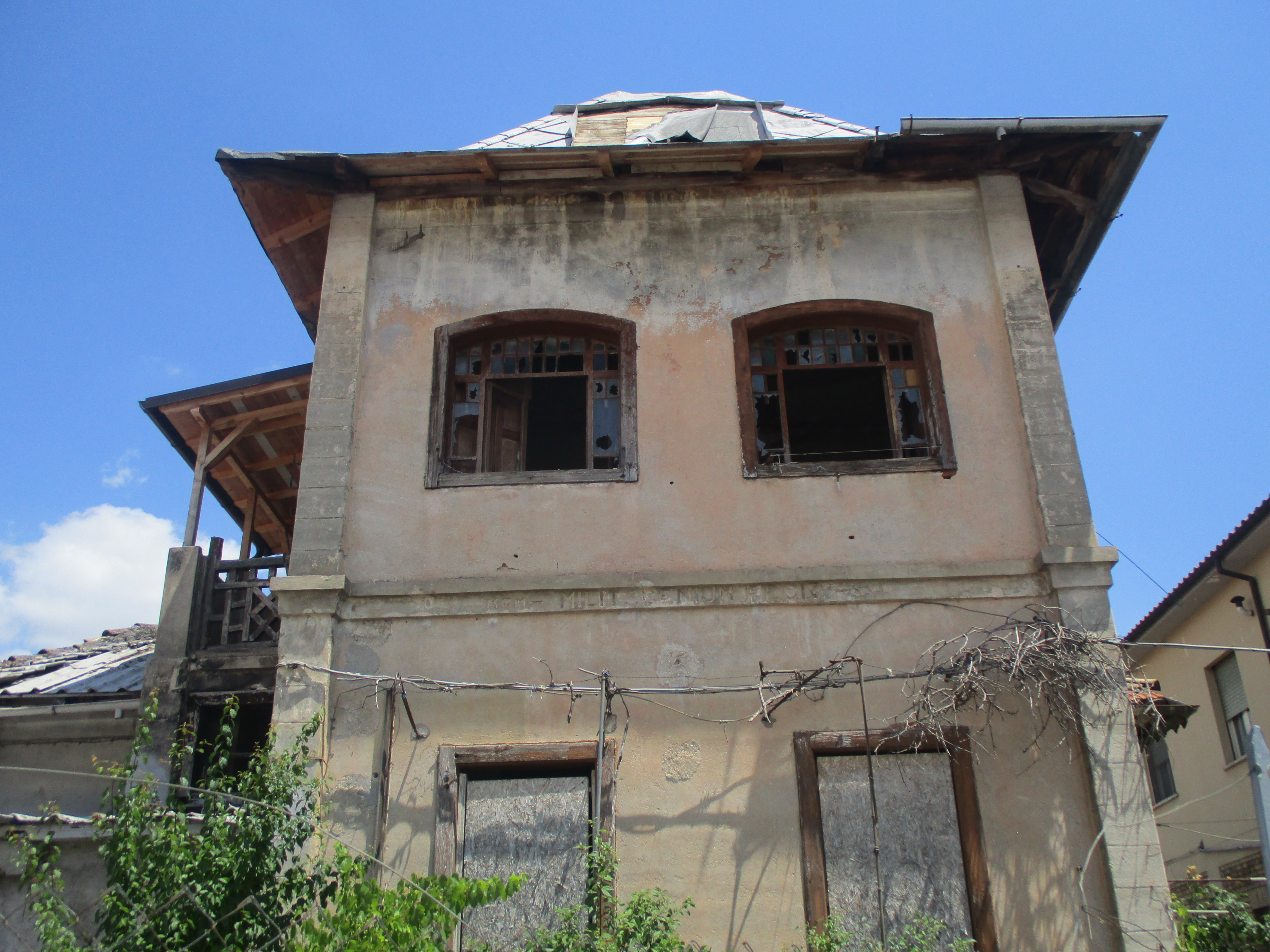 Facciata del villino